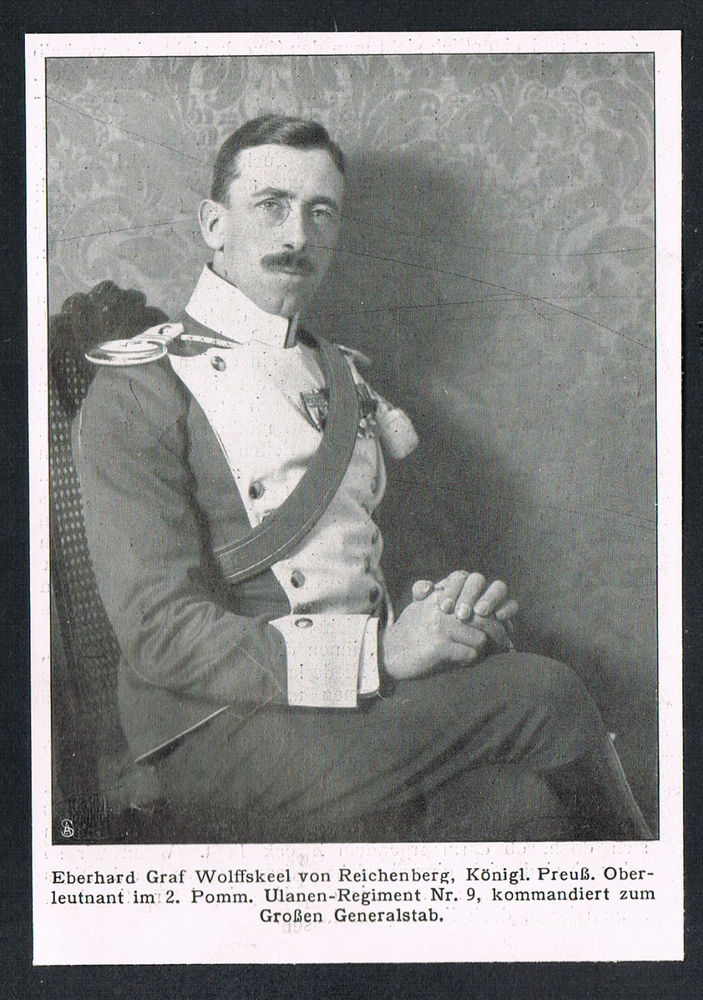 Eberhard Graf Wolffskeel von Reichenberg, Königlich Preußischer Oberleutnant im 2. Pomm. Ulanen-Regiment Nr. 9 (1910)